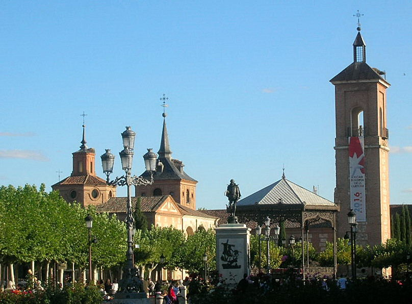 Alcala de Henares